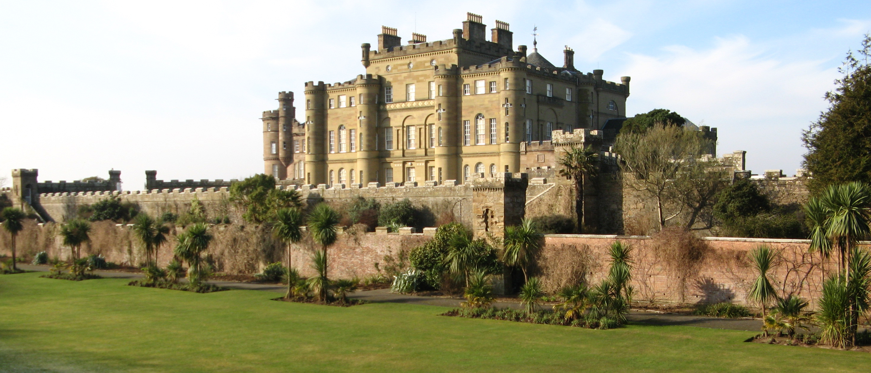 Culzean Castle & Palm Garden